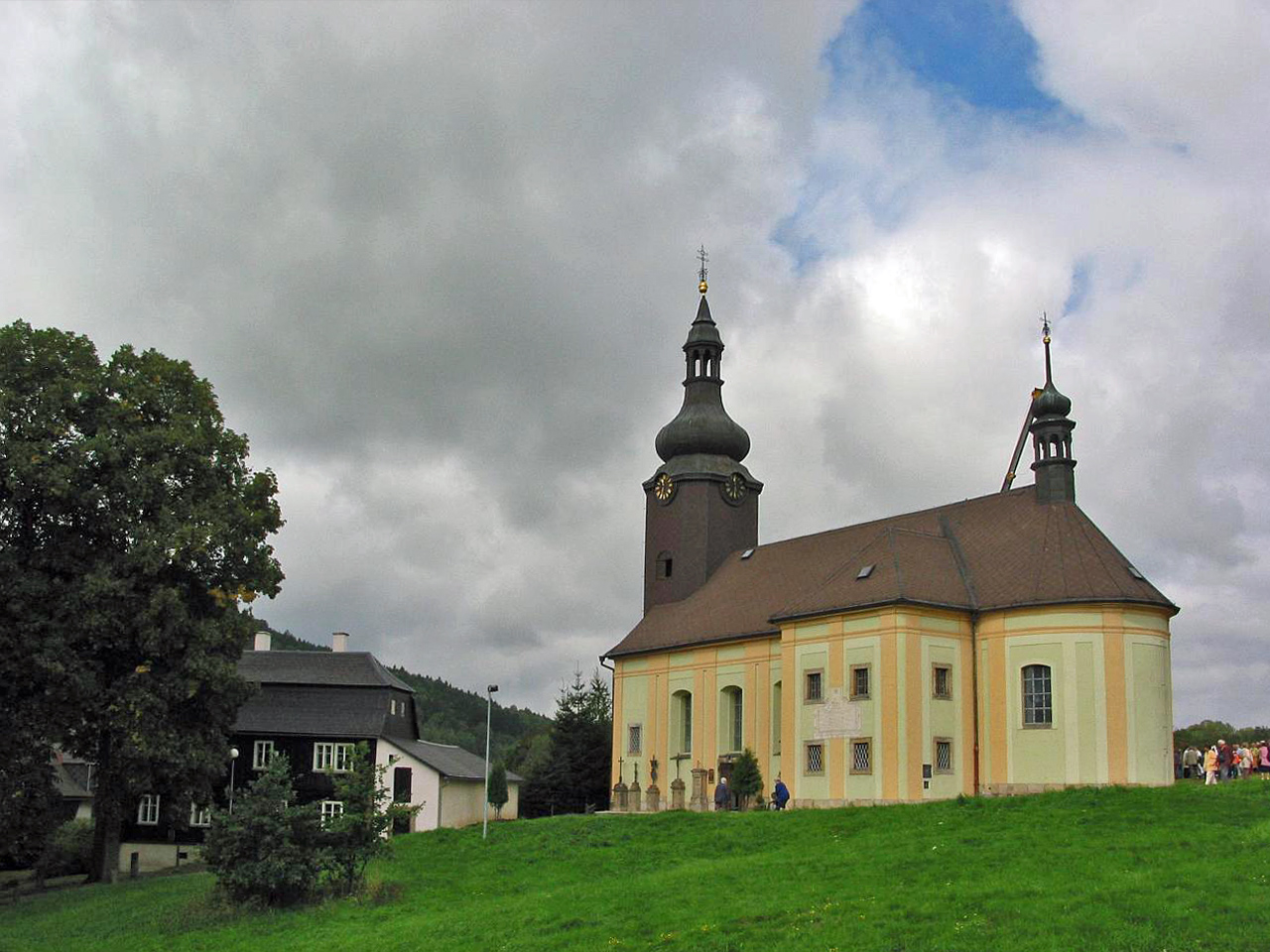 Kostel sv. Marie Magdalény v Kerharticích u České Kamenice